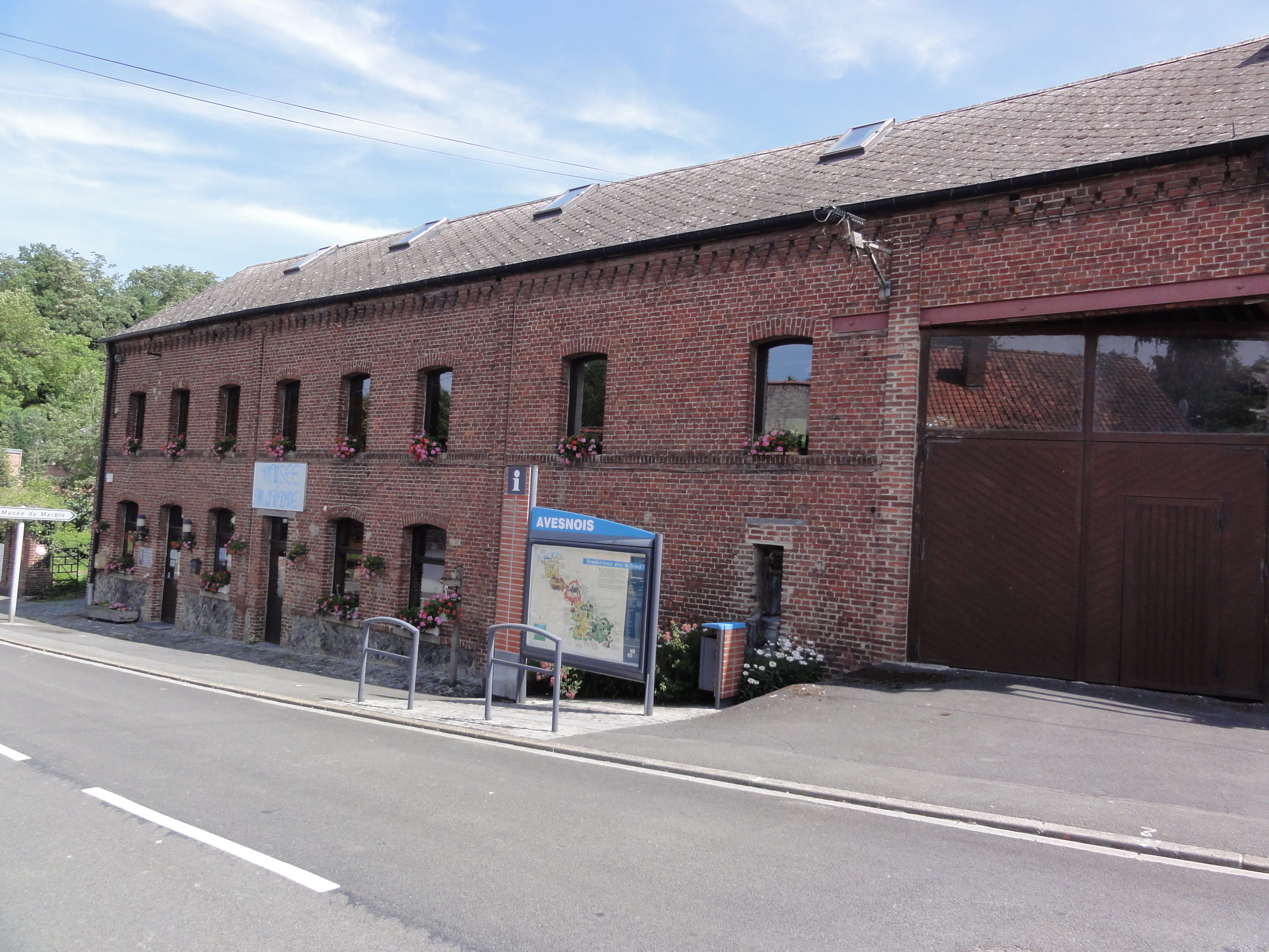 Bellignies (Nord, Fr) musée du marbre